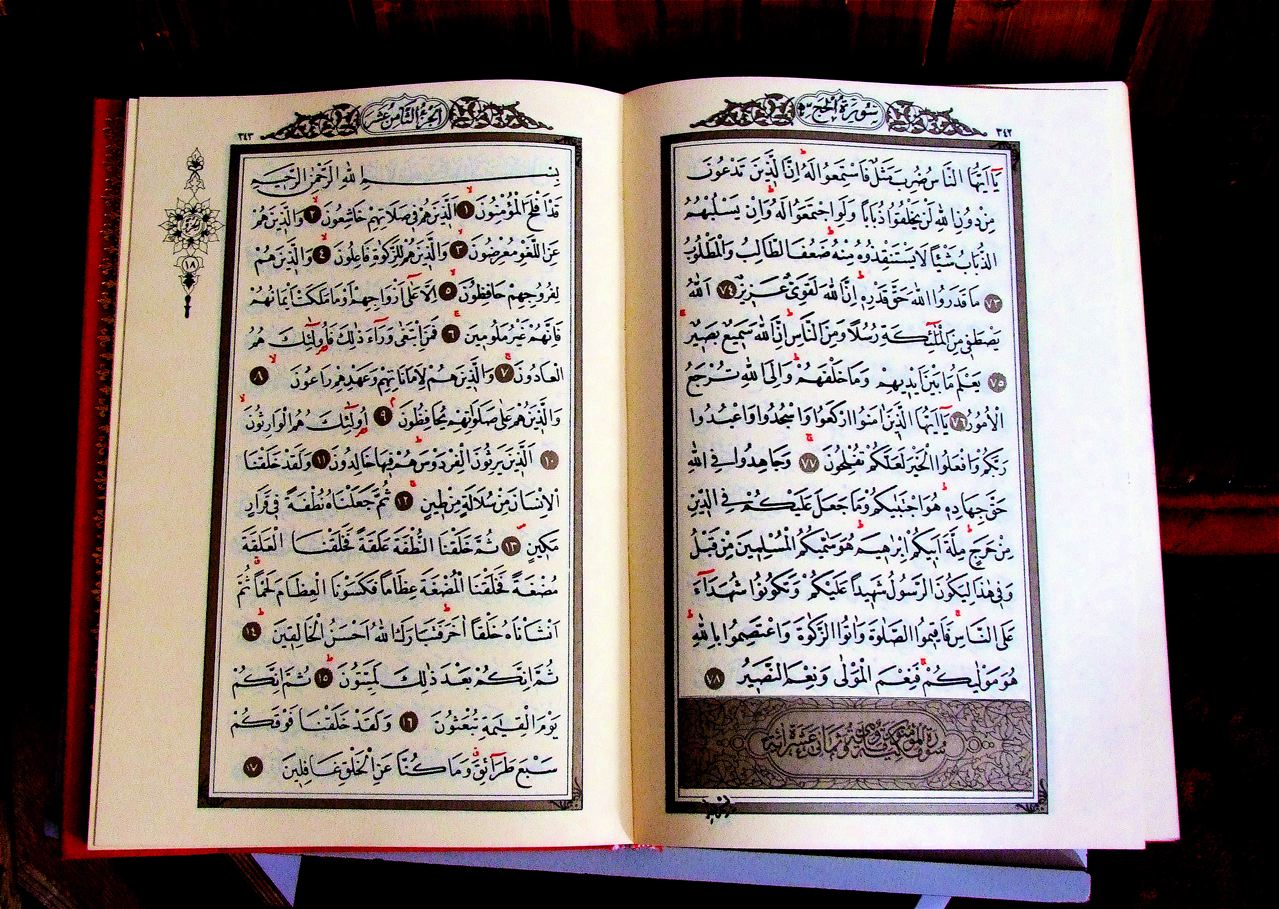 Arabisch: القرآن al-qoer'ān) is het enige van de door moslims erkende islamitische Heilige Boeken dat zuiver zou zijn overgeleverd. Volgens de islamitische traditie zijn de woorden in de Arabische taal door God via de engel Djibriel aan Mohammed "neergezonden". Het Arabische woord قرآن (qoer'ān) betekent oplezing, voordracht. Koran wordt gebruikt voor de Nederlandse vertaling. Een vertaling wordt door moslims doorgaans niet als authentiek gezien, omdat vertalen automatisch interpreteren zou betekenen. Iedere vertaling is dus 'slechts' een interpretatie. Vertalingen vertonen, door de rijkdom van de Arabische taal, op essentiële punten grote verschillen en worden dan ook niet als gezaghebbend erkend. Exegese op de Arabische Koran is wel mogelijk en wordt tafsir genoemd. De bekendste islamitische geleerden (oelema) spreken daarom over een 'exegetische vertaling'. Inhoud